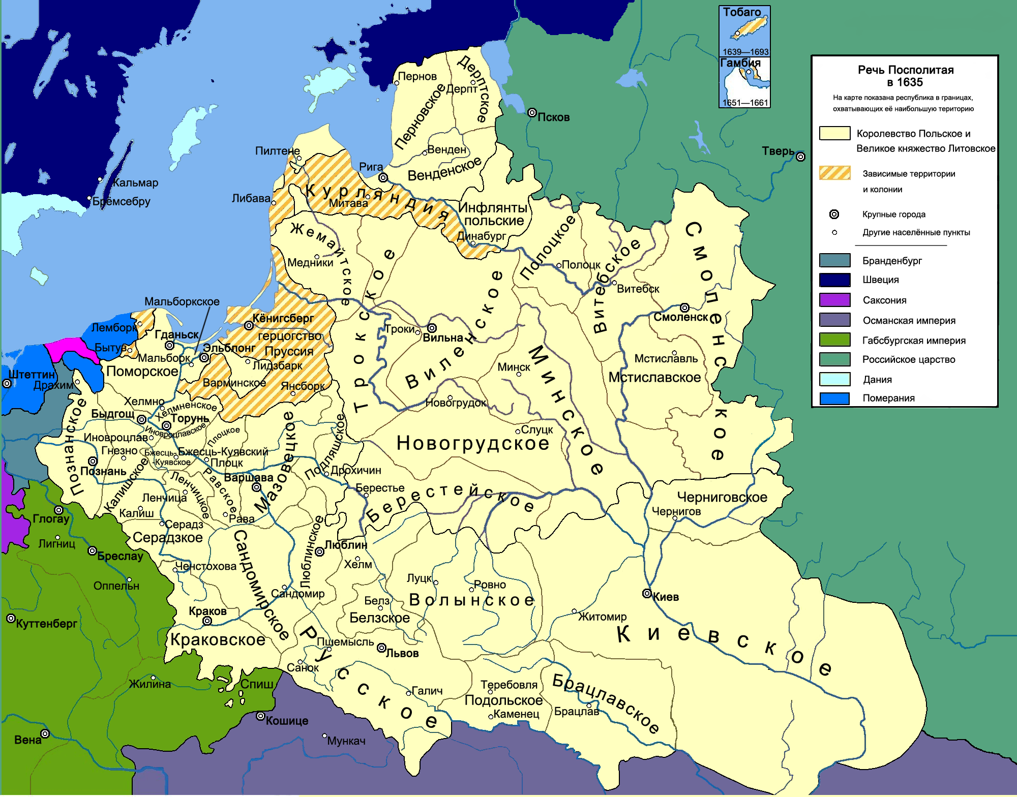 Карта Речи Посполитой (1635 год)